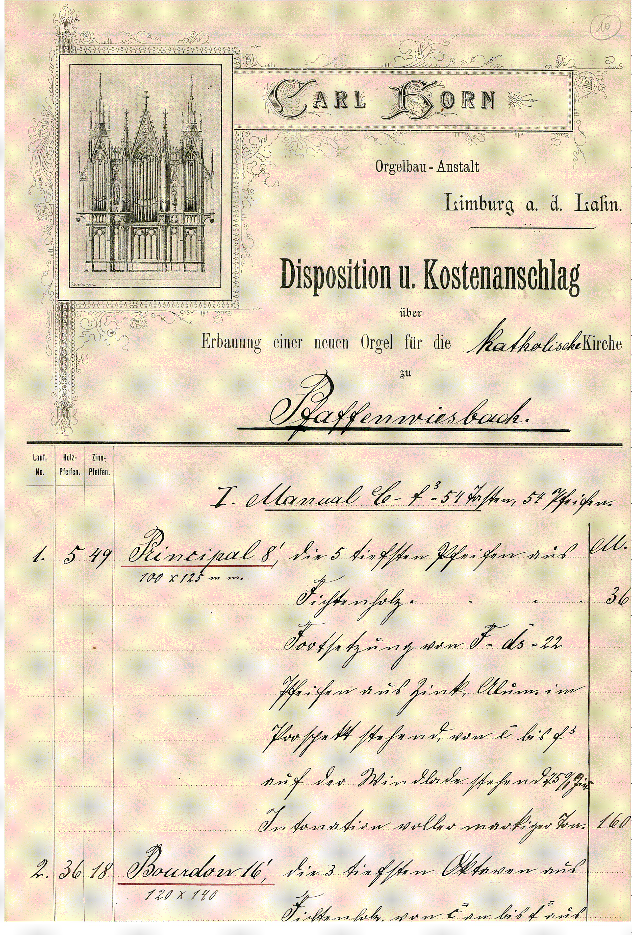 Disposition und Kostenanschlag von Carl Horn Seite 1 (1910) für die St. Georgs-Kirche in Pfaffenwiesbach